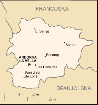 Vlastita izrada slike